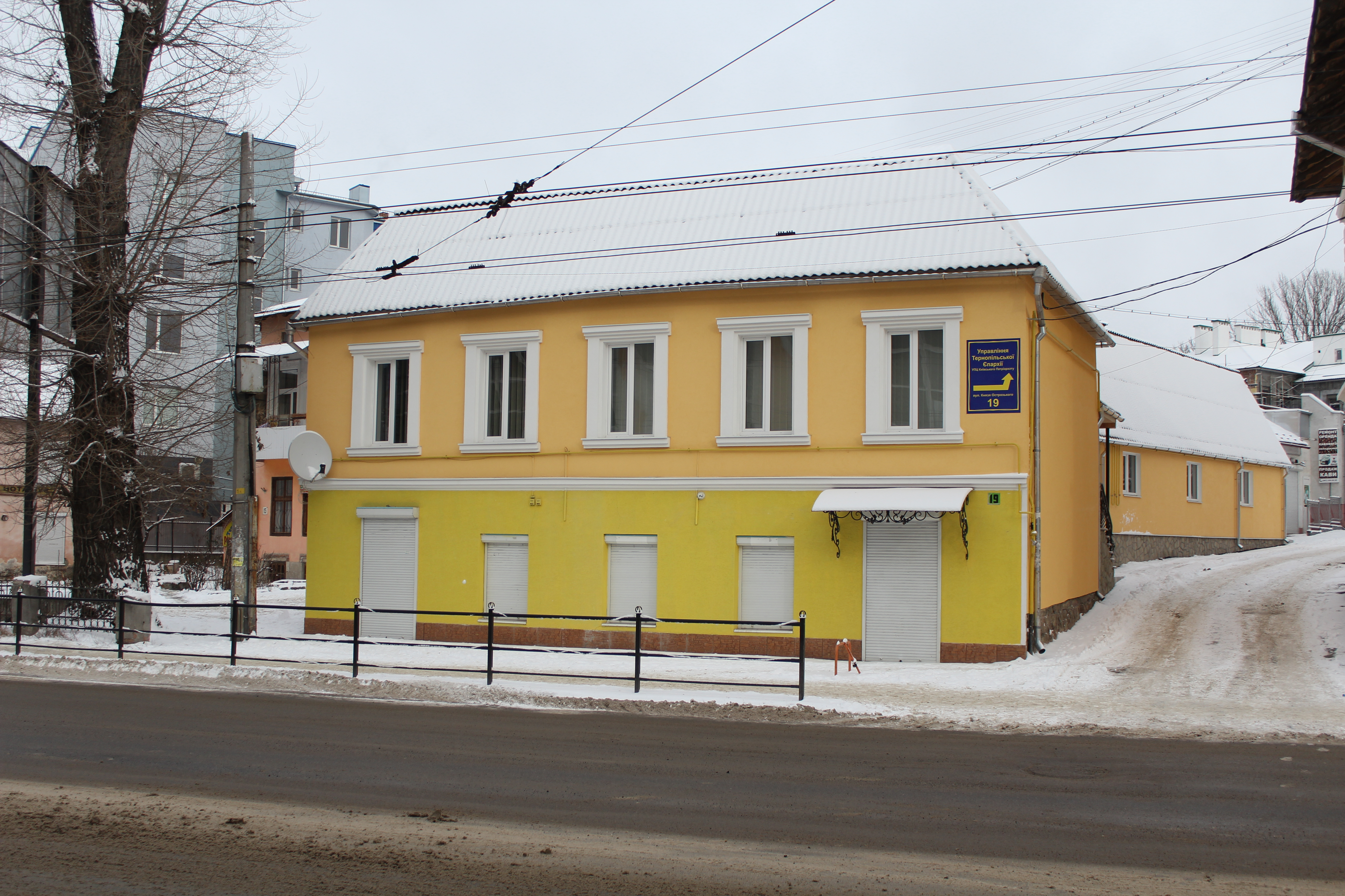 Житловий будинок (мур.), Тернопіль, вул. Князя Острозького, 19